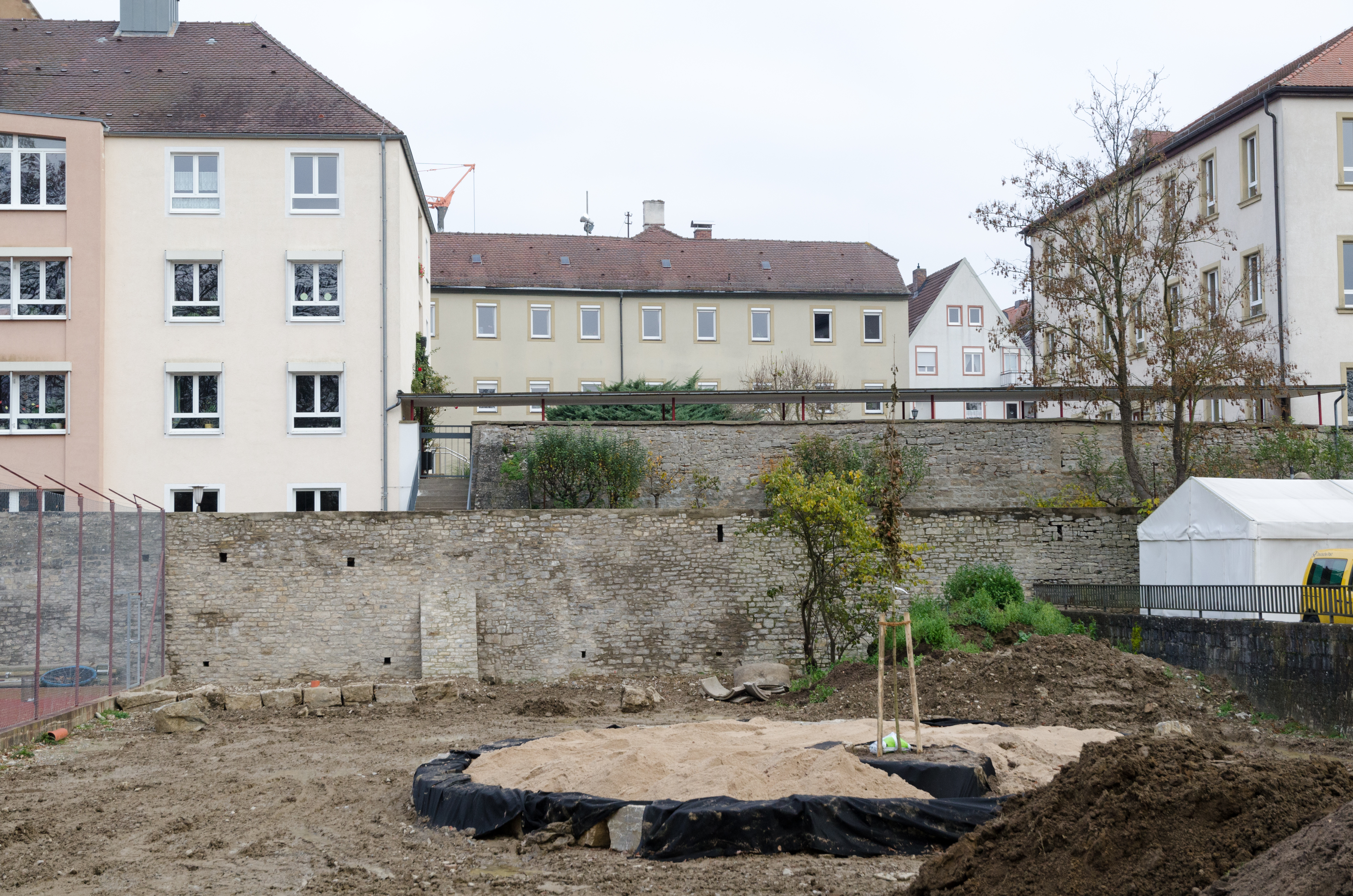 Volkach, Stadtmauer, Klostergasse 1, Westseite